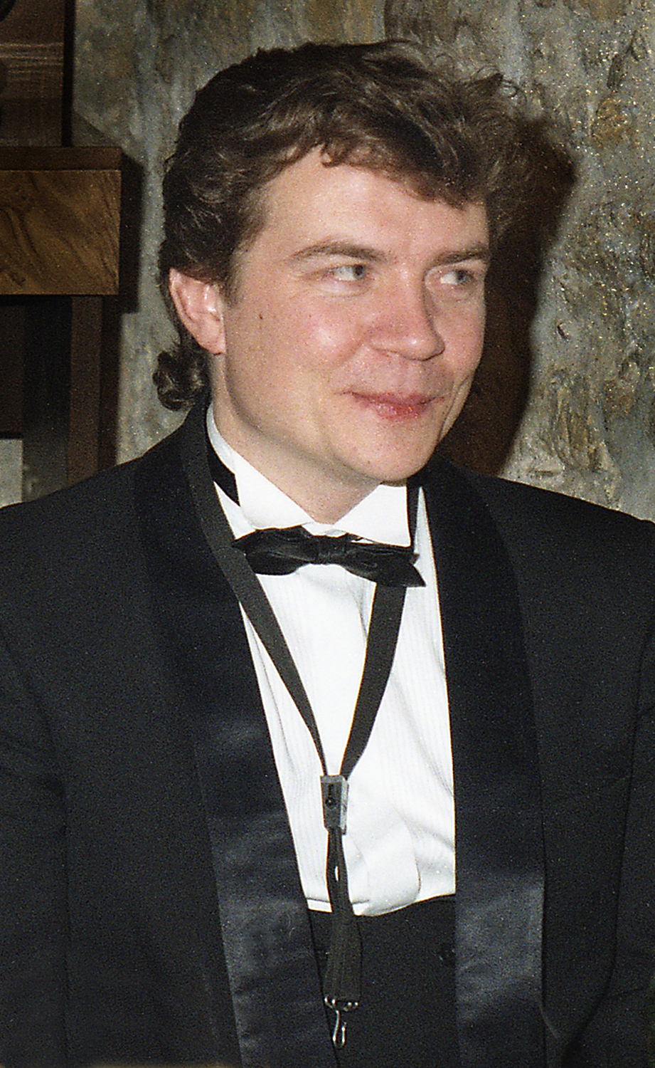 Karl Madis, eesti laulja 97